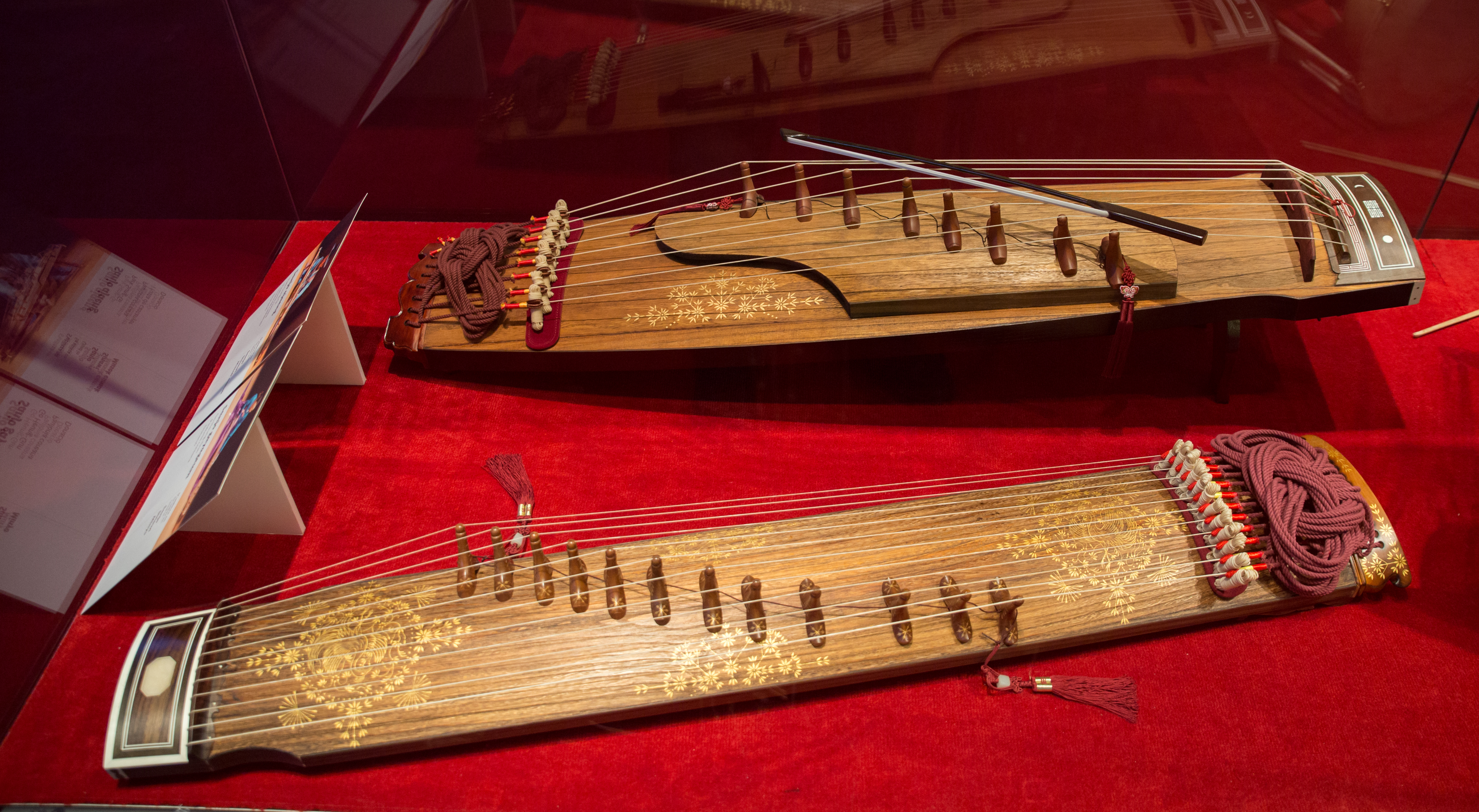 Sanjo ajaeng i sanjo gayageum, exposats a Eolssigu! Els sons de Corea